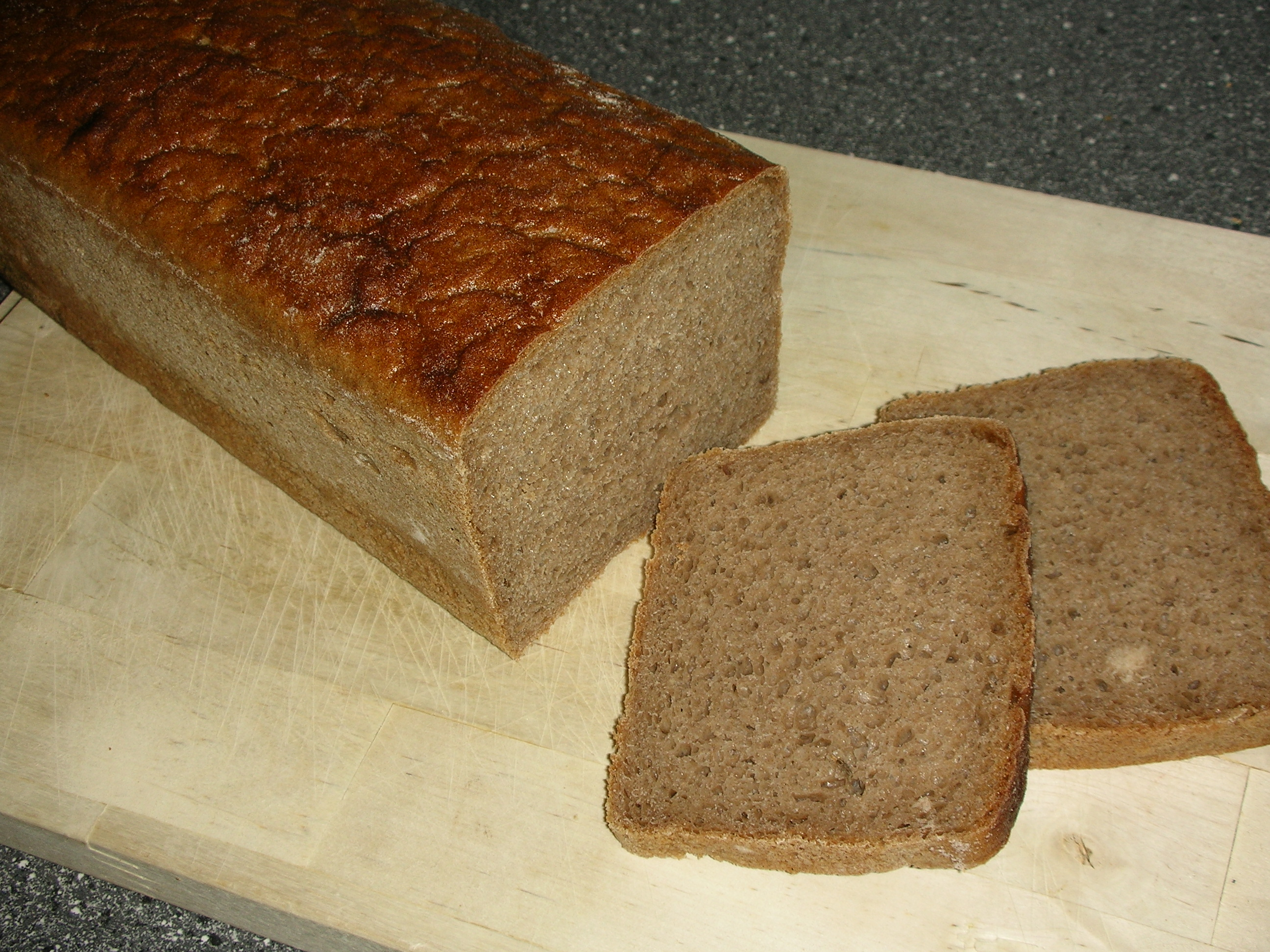 Moskauer Brot, von einer tschechischen Bäckerei in Dresden